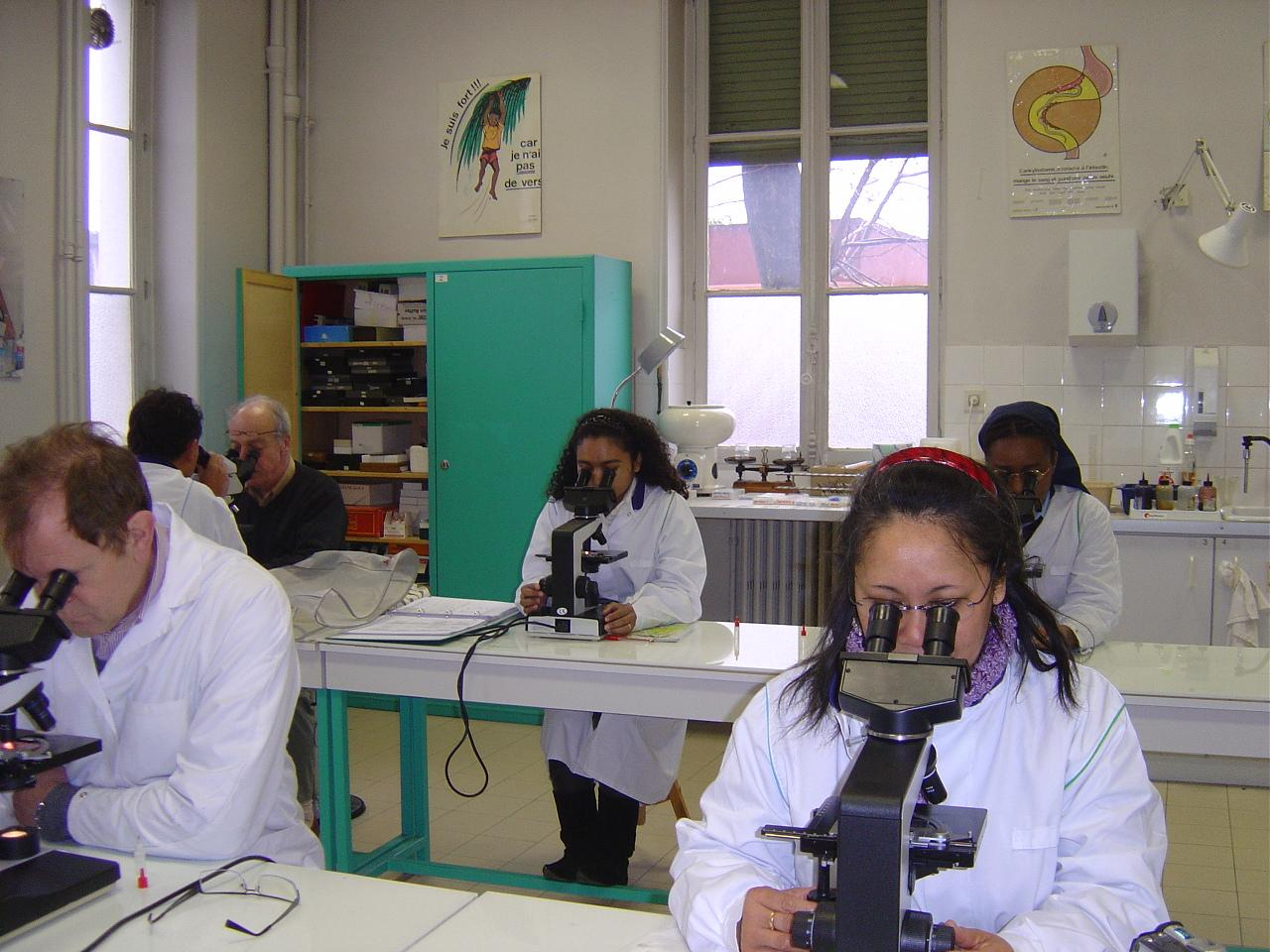 Lyon (Rhône, France) - Séance de travaux pratiques de laboratoire à l'association médicale missionnaire.